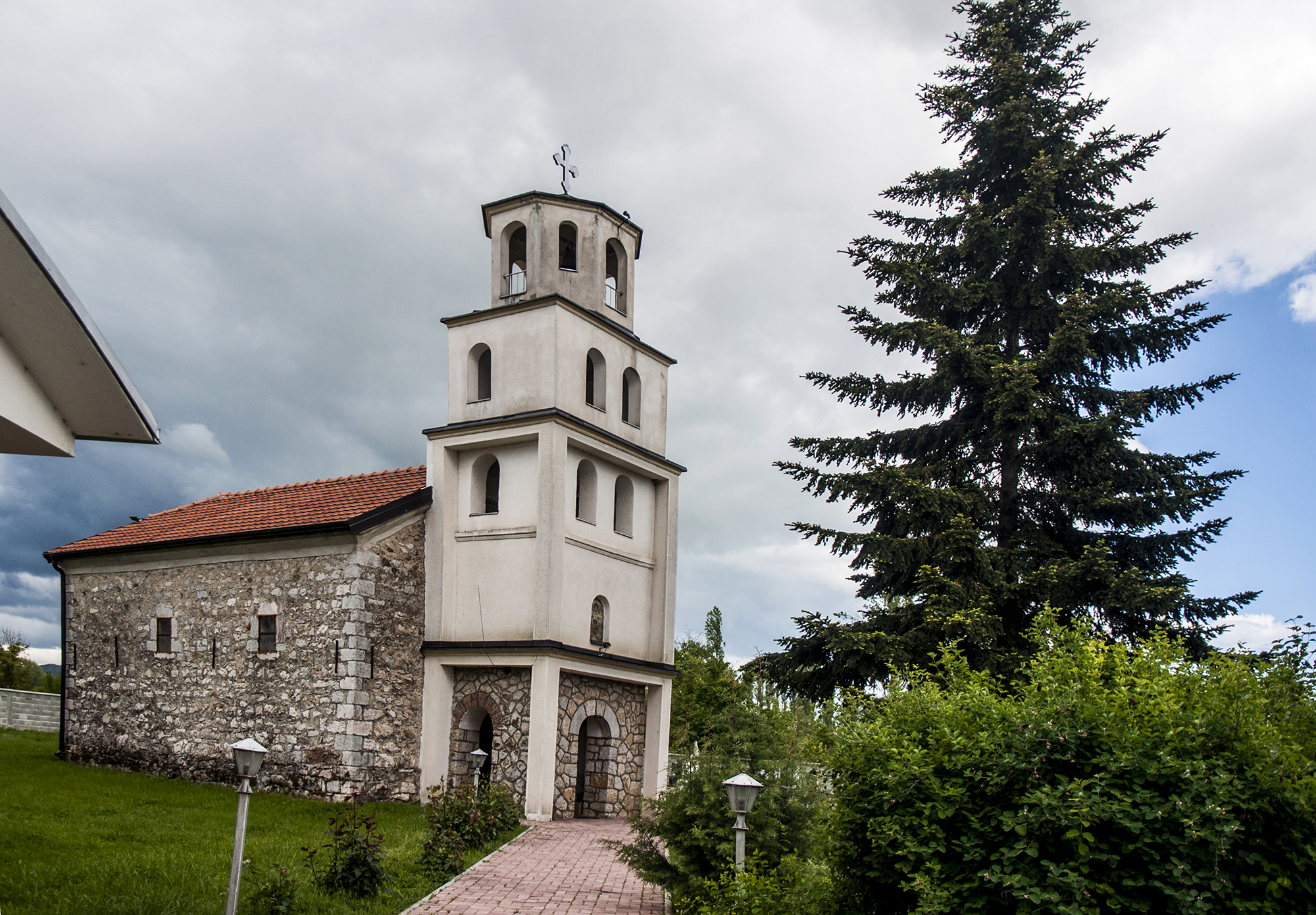 Црквата Свети Спас во Биџево